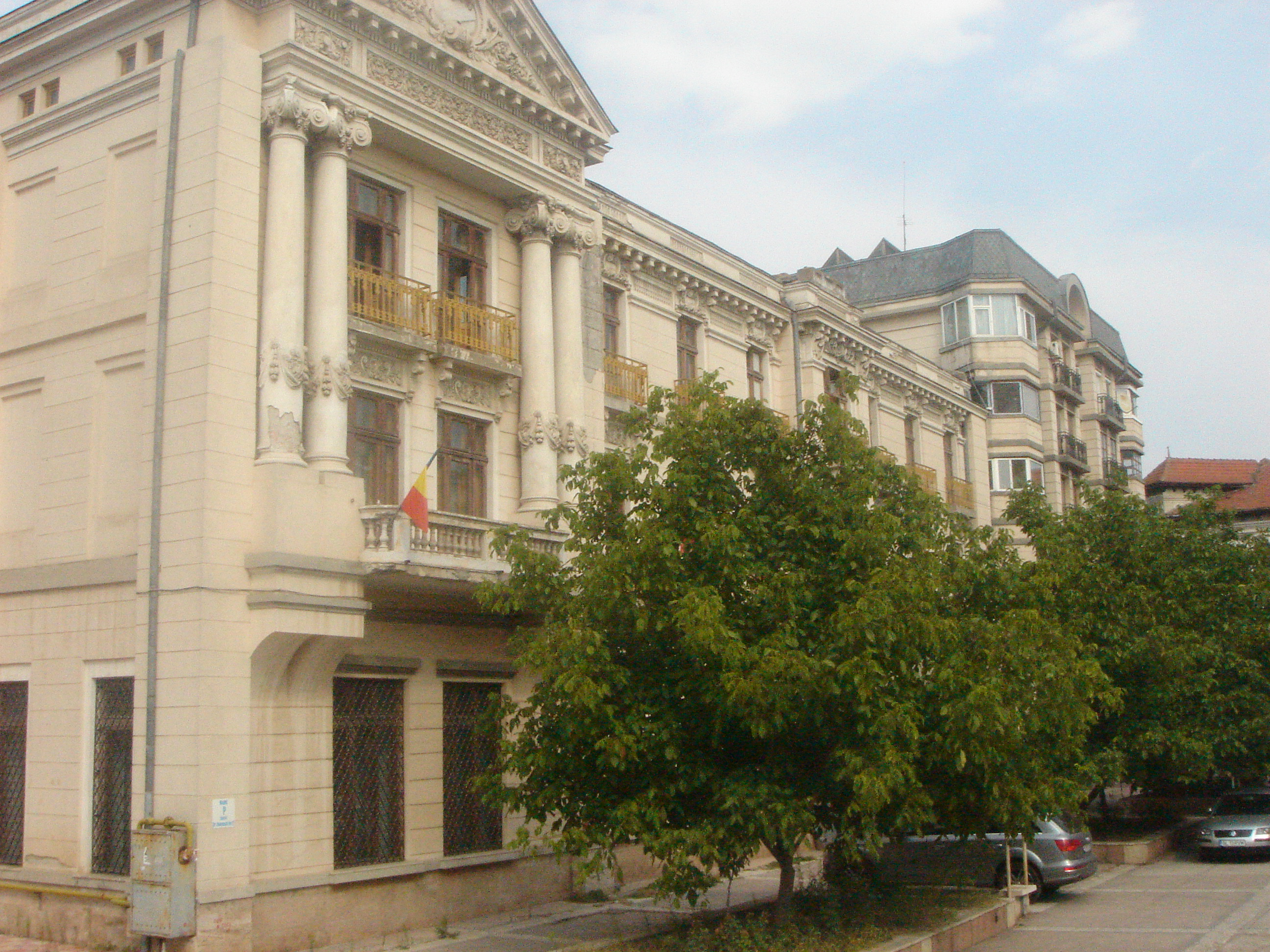 Muzeul de Istorie Galati, inaugurat in 1939.